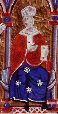 (Pope Innocent IV at the Council of Lyon between bishops Source: MS 1. Syracuse University Library, Department of Special Collections. Dated: pre 1278 Category:Popes)